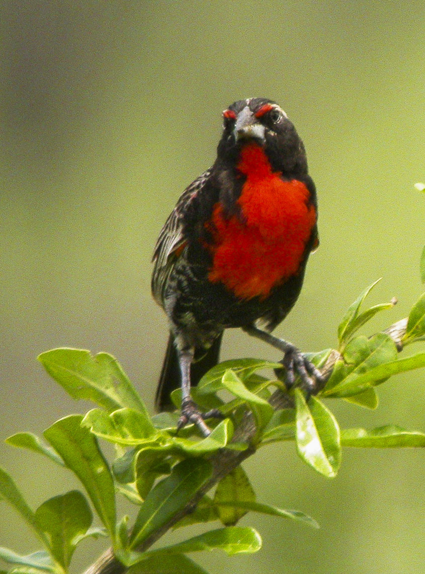 Peruvian Meadowlark - Ecuador 05 dgs(2)